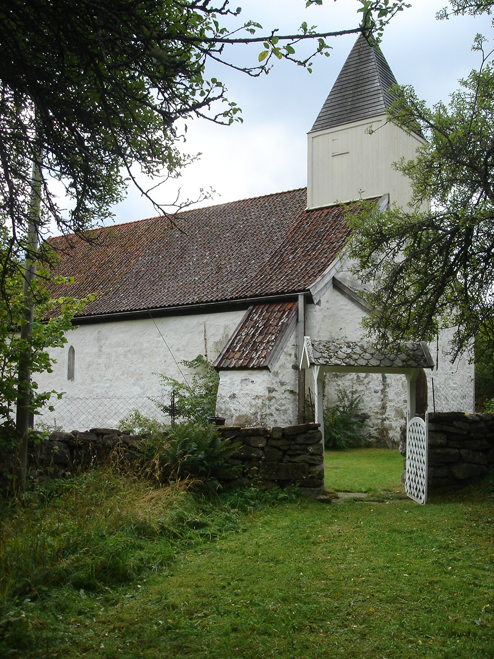 Kvamsøy kyrkje, Kvamsøy kirke, Kvamsøy Church